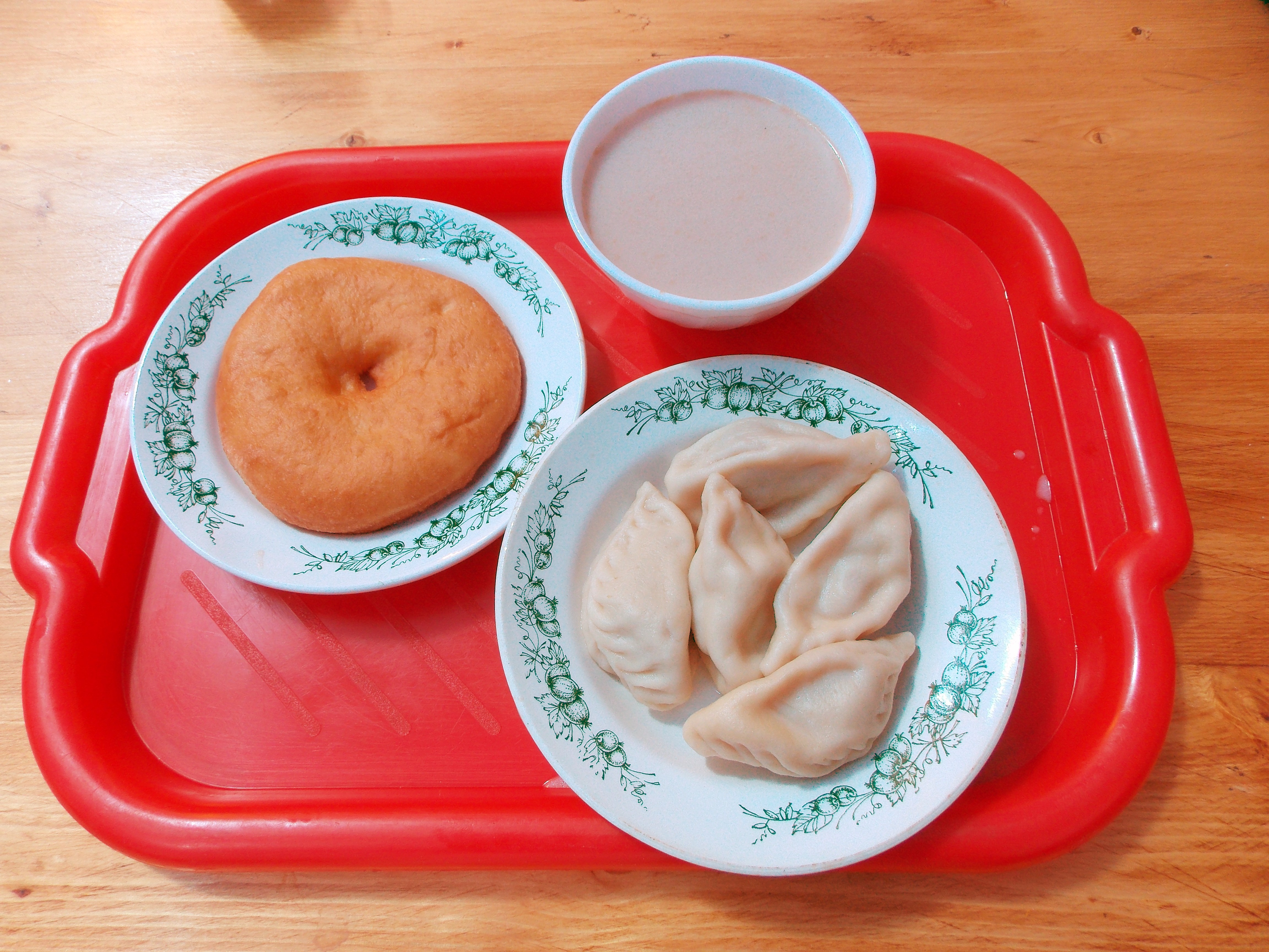 Калмыцкие национальные блюда: джомба (молочный чай кочевника), бёриги (пельмени), борциги (лепёшки).